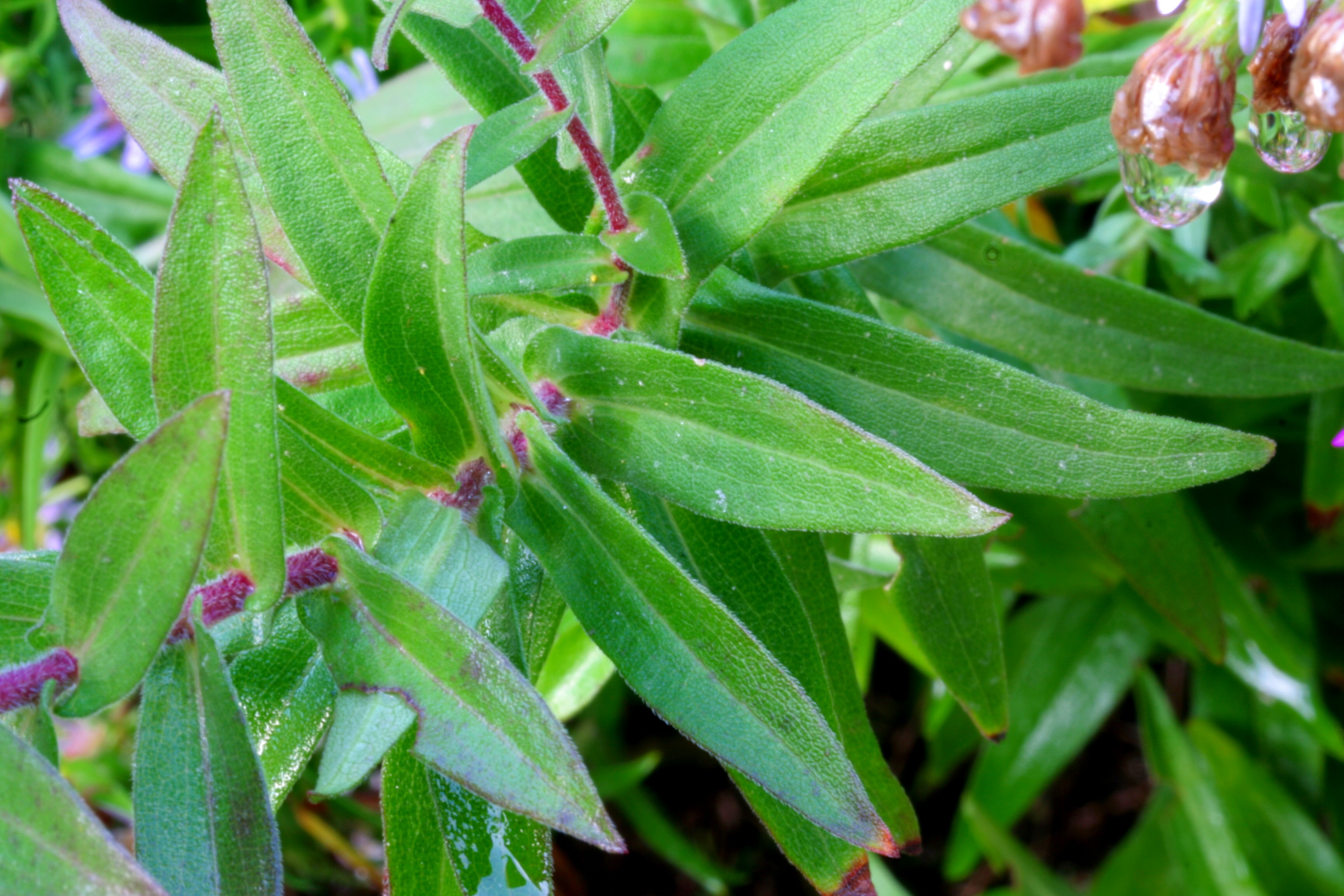 Astro di Virgilio, Villa Prima, Limana (BL), 350 m s.l.m.